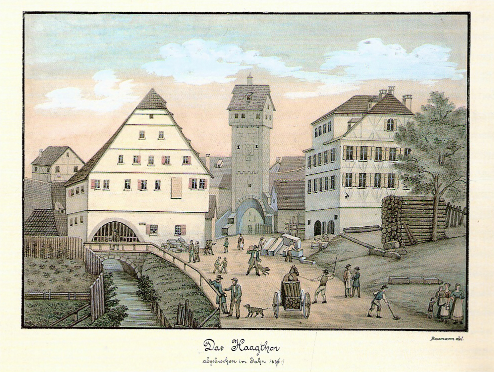 "Das Haagthor abgebrochen im Jahr 1834". Ansicht aus den 1820er Jahren. In Wirklichkeit wurde das Haagtor 1831 abgebrochen. (Gouache, Motiv/Blatt: 16,5 x 23,6 cm; Träger: 25 x 31 cm; Schefold 9452b)